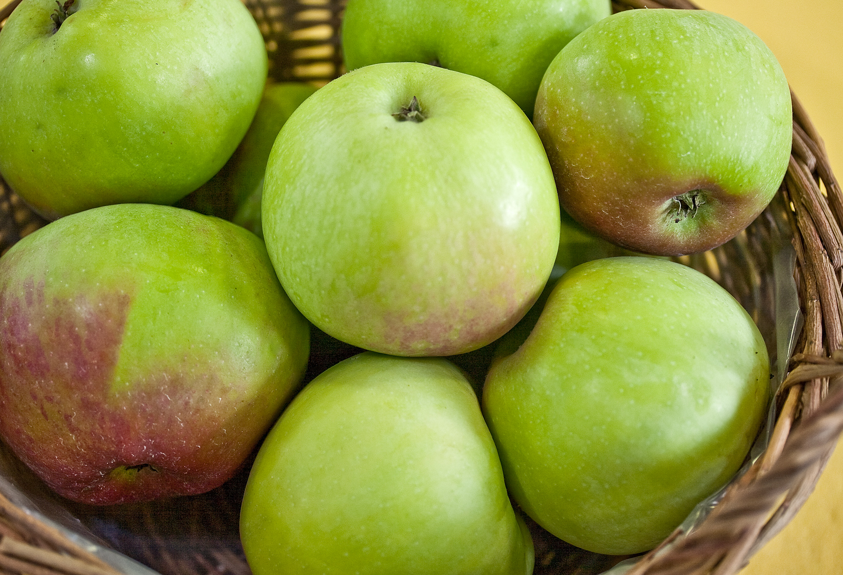 Der Korbiniansapfel ist eine Apfelsorte